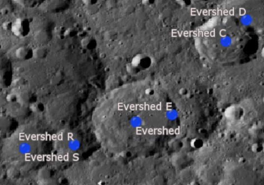 Cráter Evershed. Cráteres satélite (Imagen LROC)